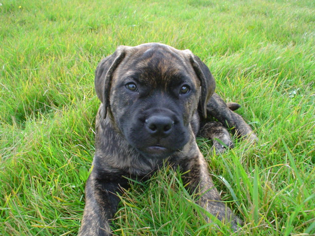 Shayla's wedding n vegas (VEGAS)